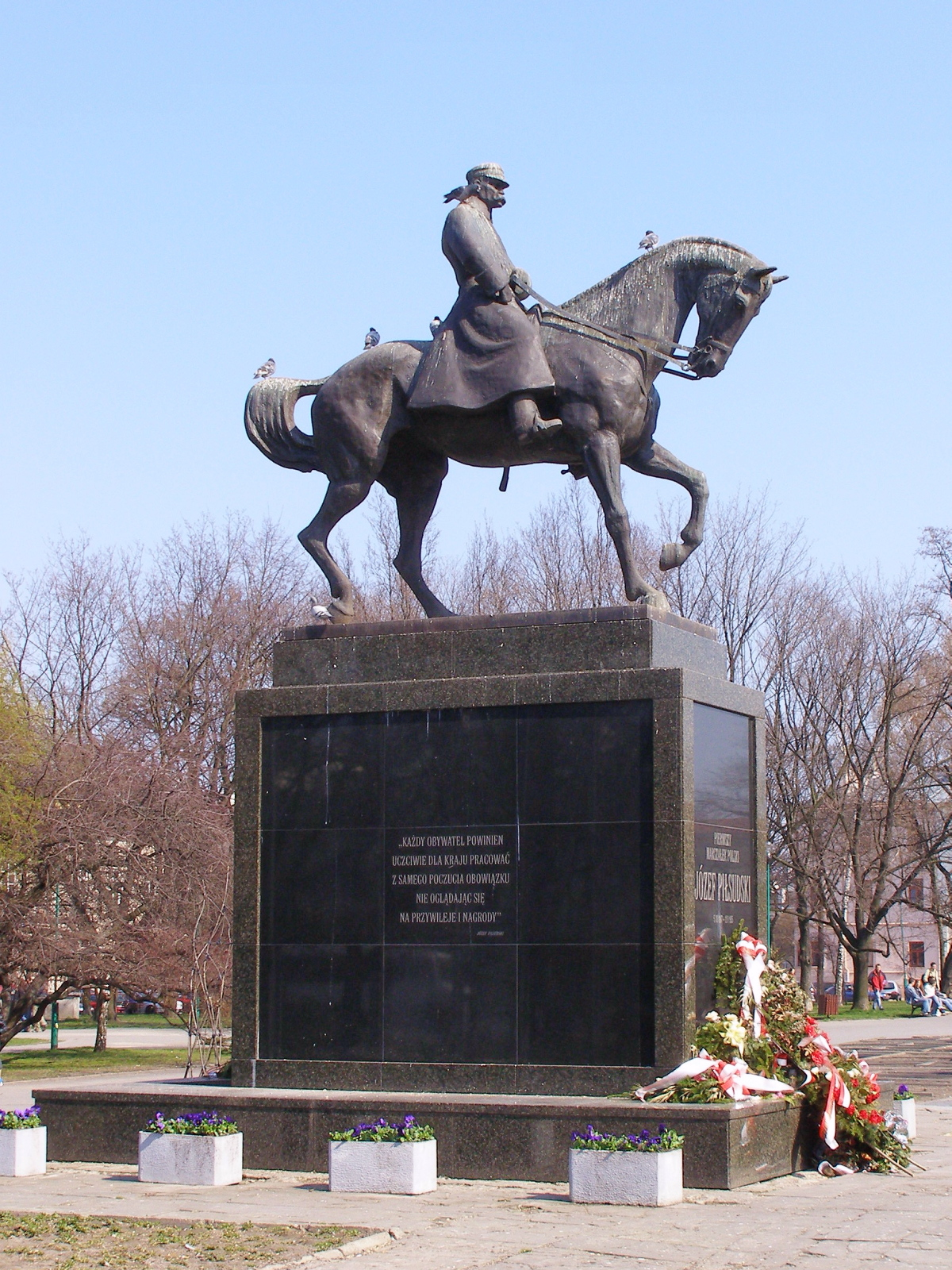 Pomnik Marszałka Józefa Piłsudskiego w Lublinie